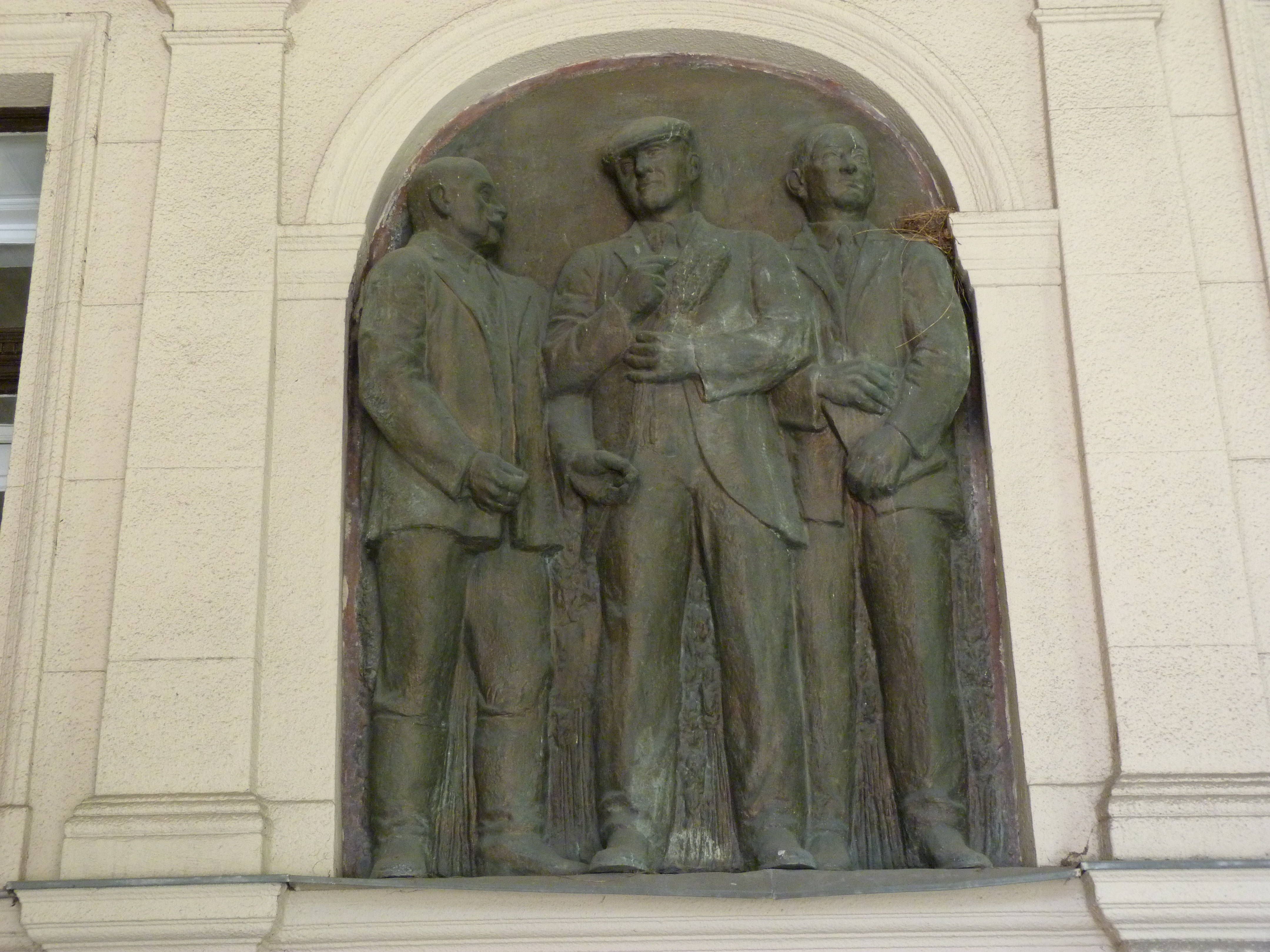 A felvétel 2012. május 19 -én készült Budapesten. A Mezőgazdasági és Vidékfejlesztési Minisztérium fala. Baross László emléklapja.